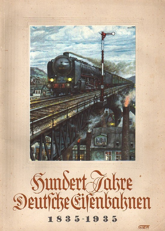 Cover of "Hundert Jahre Deutsche Eisenbahnen", painting by Hans Baluschek